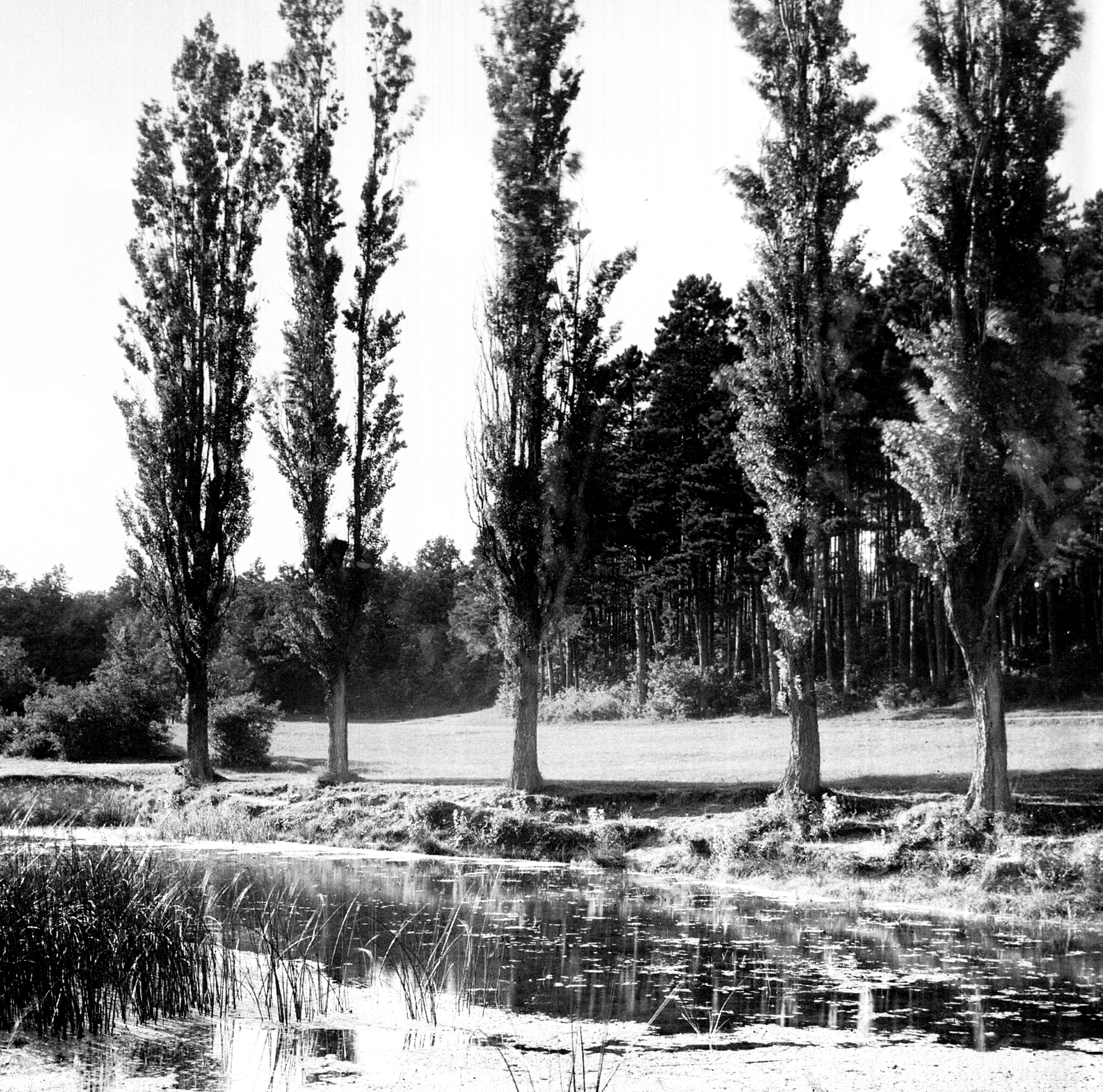 Der Pappelteich bei Mauer, Wien, war ein schon im 19. Jahrhundert bestehender kleiner Teich im Maurer Wald. Er wurde um 1940 als Badeanlage für die Bewohner der nahe liegenden (nie vollständig ausgebauten) Luftnachrichtentruppenkaserne in Mauer ausgebaut. Die Uferbefestigungen aus Beton und Ziegeln stammen aus dieser Zeit.